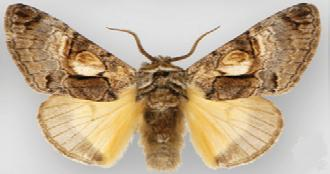 Charadra coyopa male